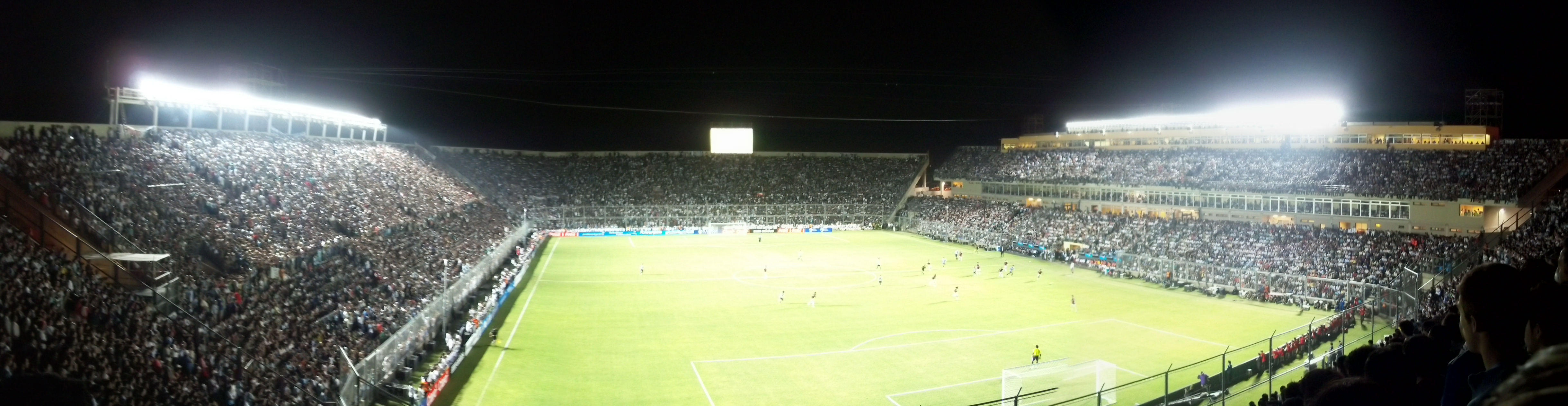 Estadio Juan Giberto Funes, departamento La Capital, provincia de San Luis, Argentina.